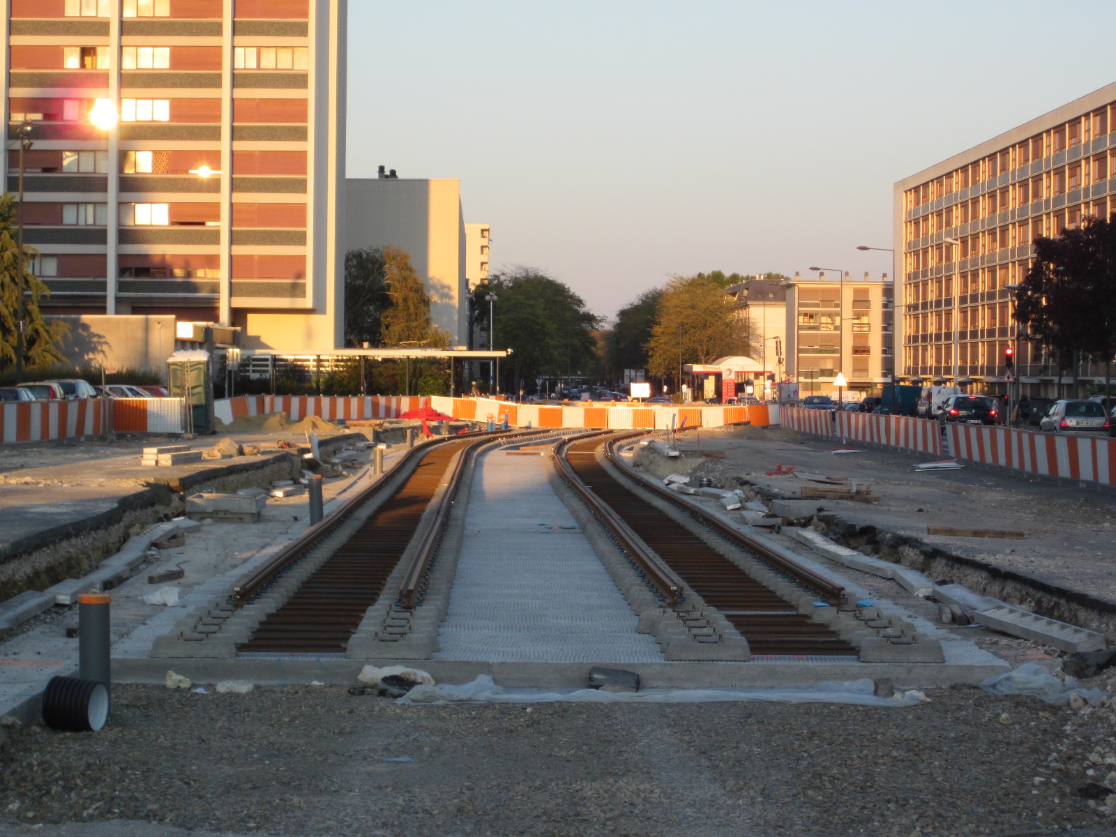 Travaux de la première ligne de tramway de Tours, place du Commandant Tulasne, quartier du Sanitas, le 1er octobre 2011.